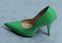 Damenmodell (Vintageschuh)